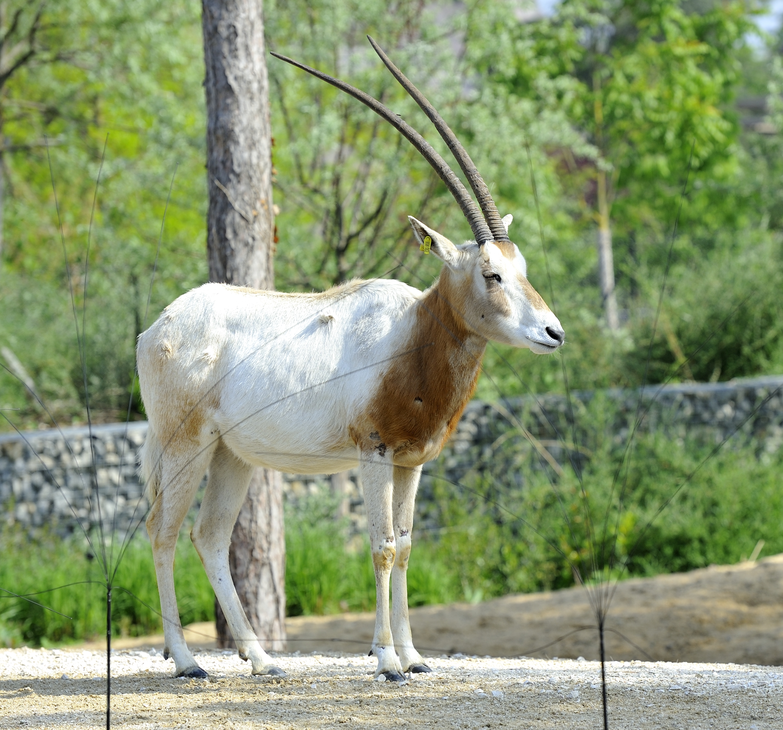 Zoo de Vincennes, Paris, France.